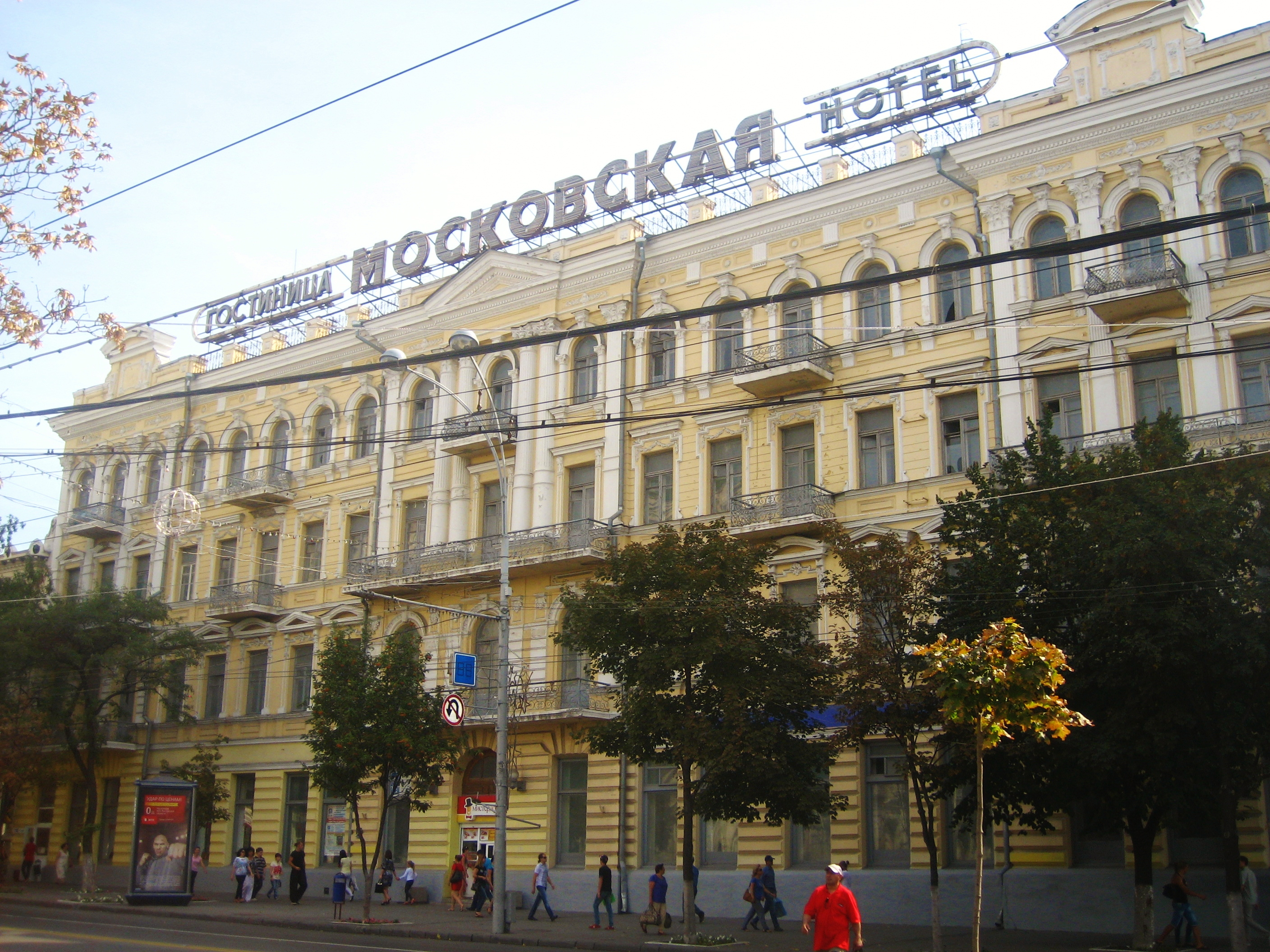 Гостиница (Hotel) "Московская". Находится в городе Ростов-на-Дону, в самом его центре, на улице Большая Садовая (бывшая ул. Энгельса), напротив парка им. М.Горького. Сейчас временно закрыта в связи с ремонтными работами.